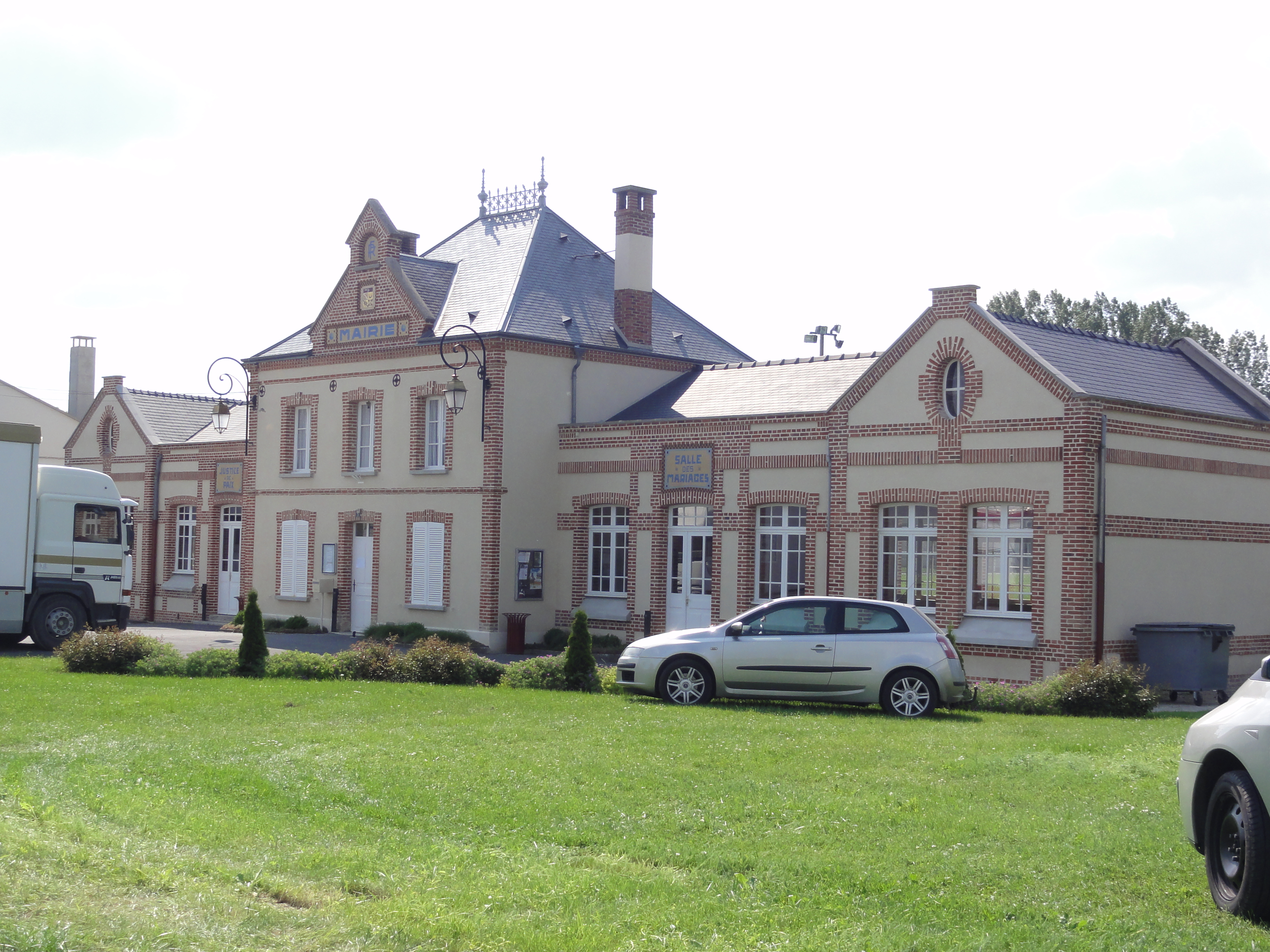 Asfeld (Ardennes) Mairie